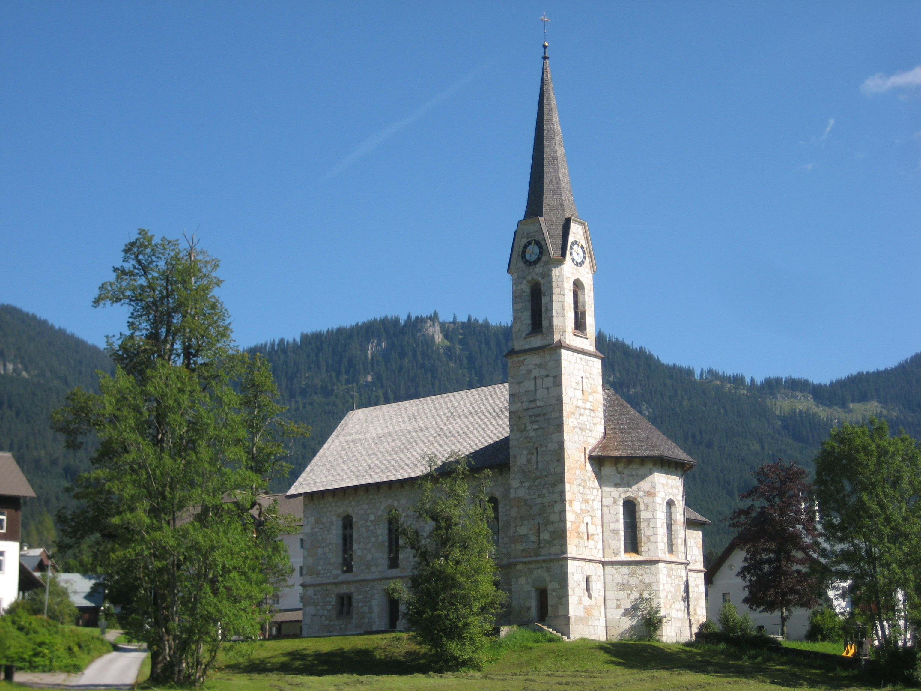 Evang. Pfarrkirche A.B.